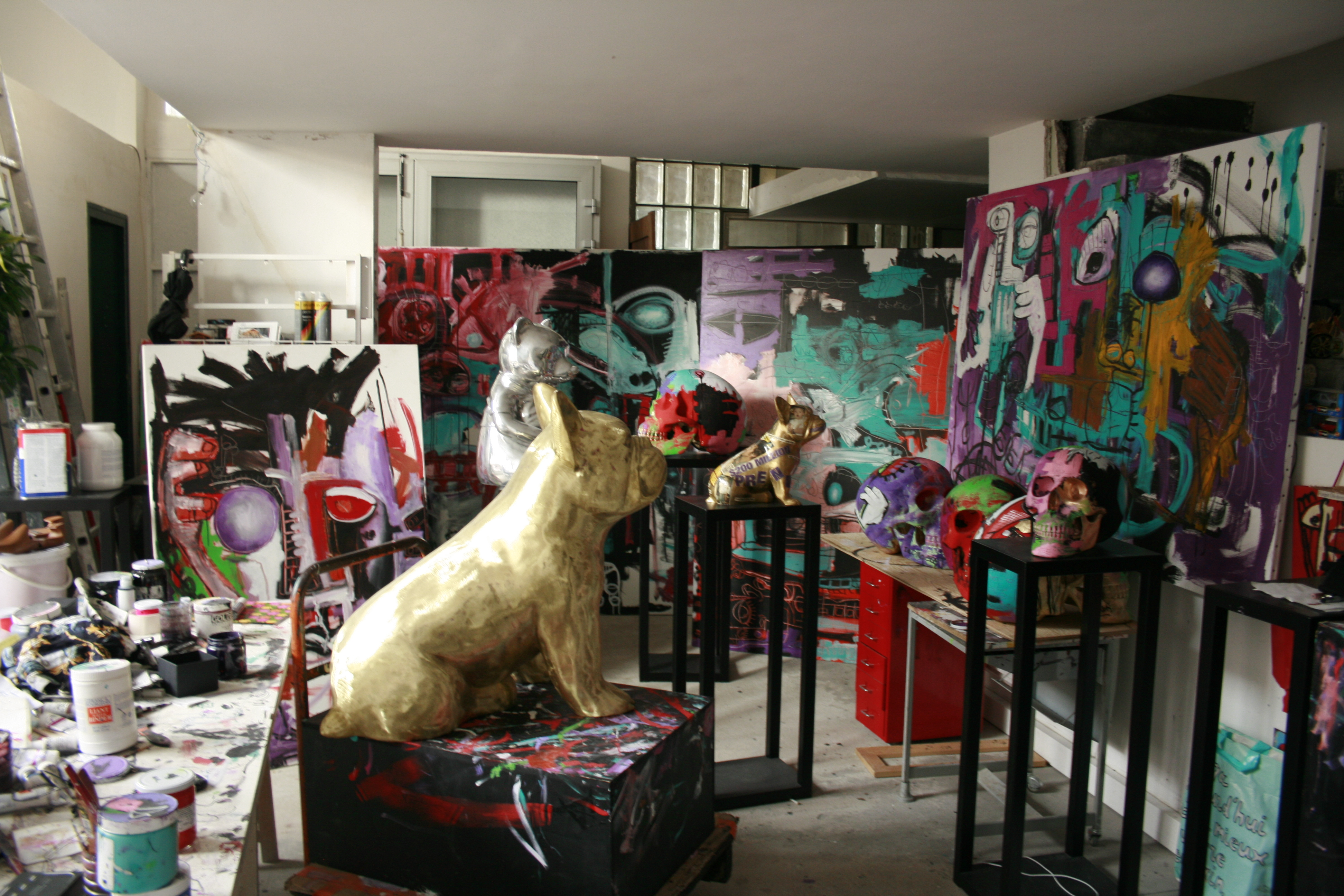 Sculptures et peintures 2011